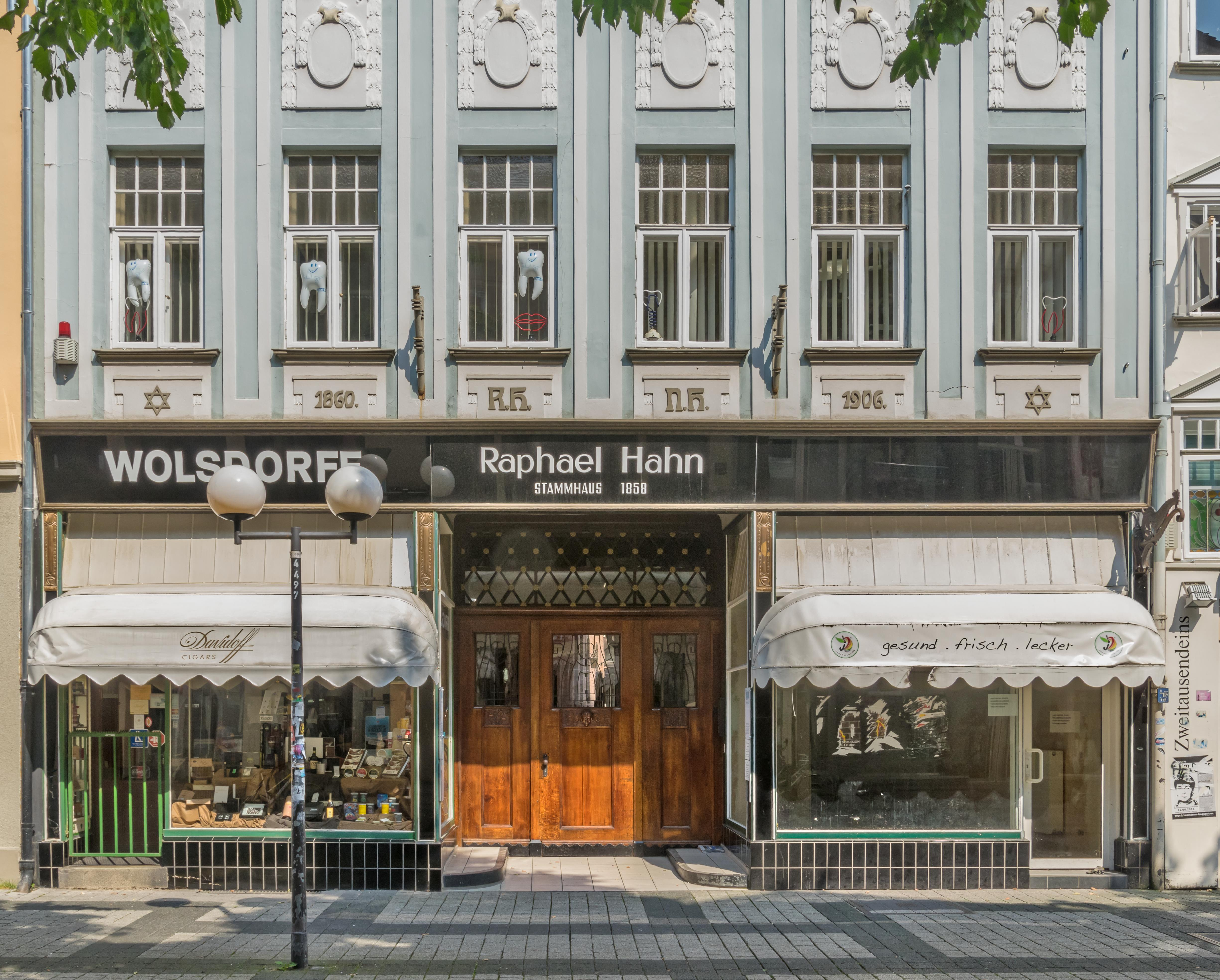 Bilder aus Göttingen Das Hahn-Haus in der Weender Straße